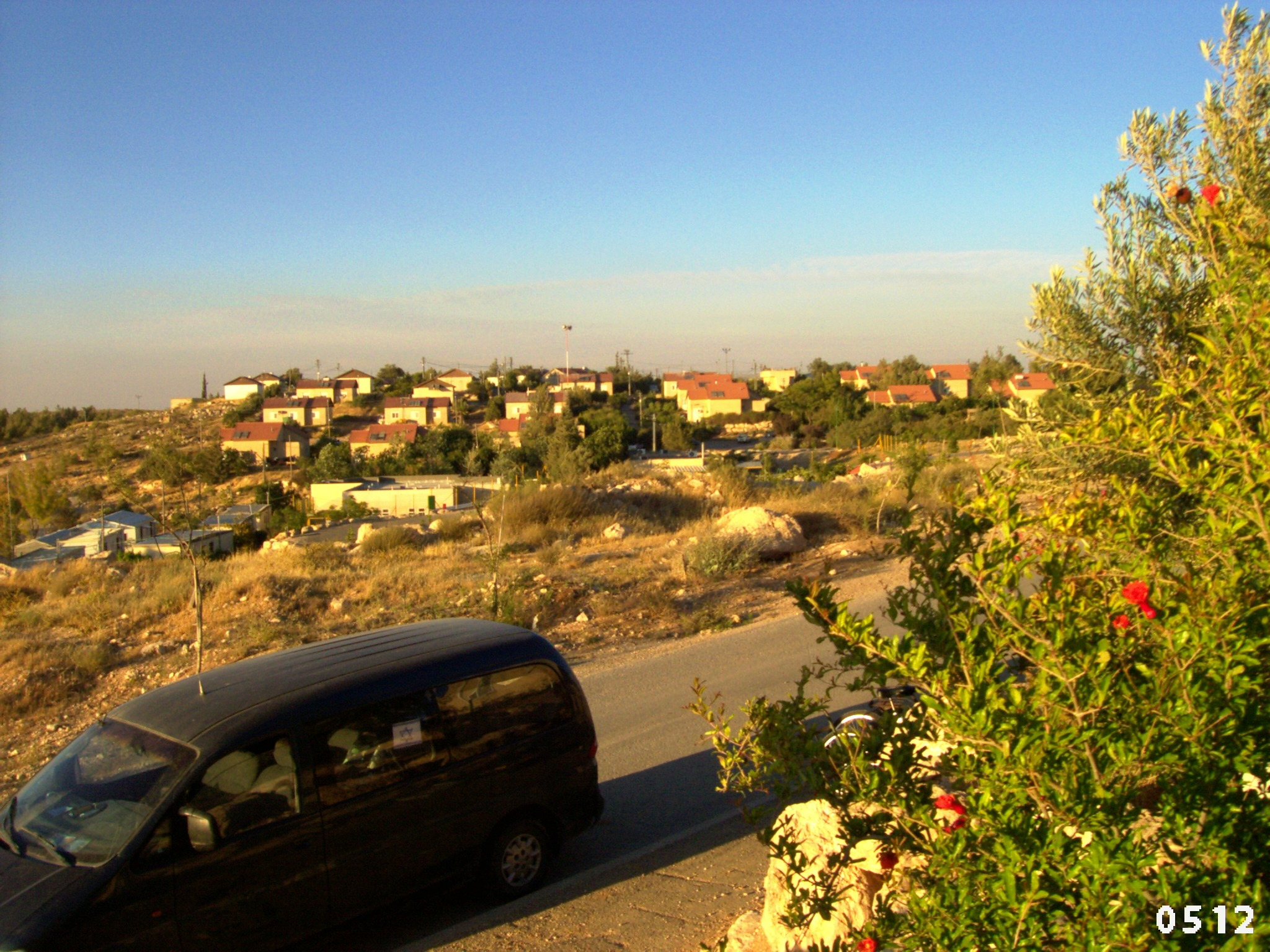 maon settlement a jeuda